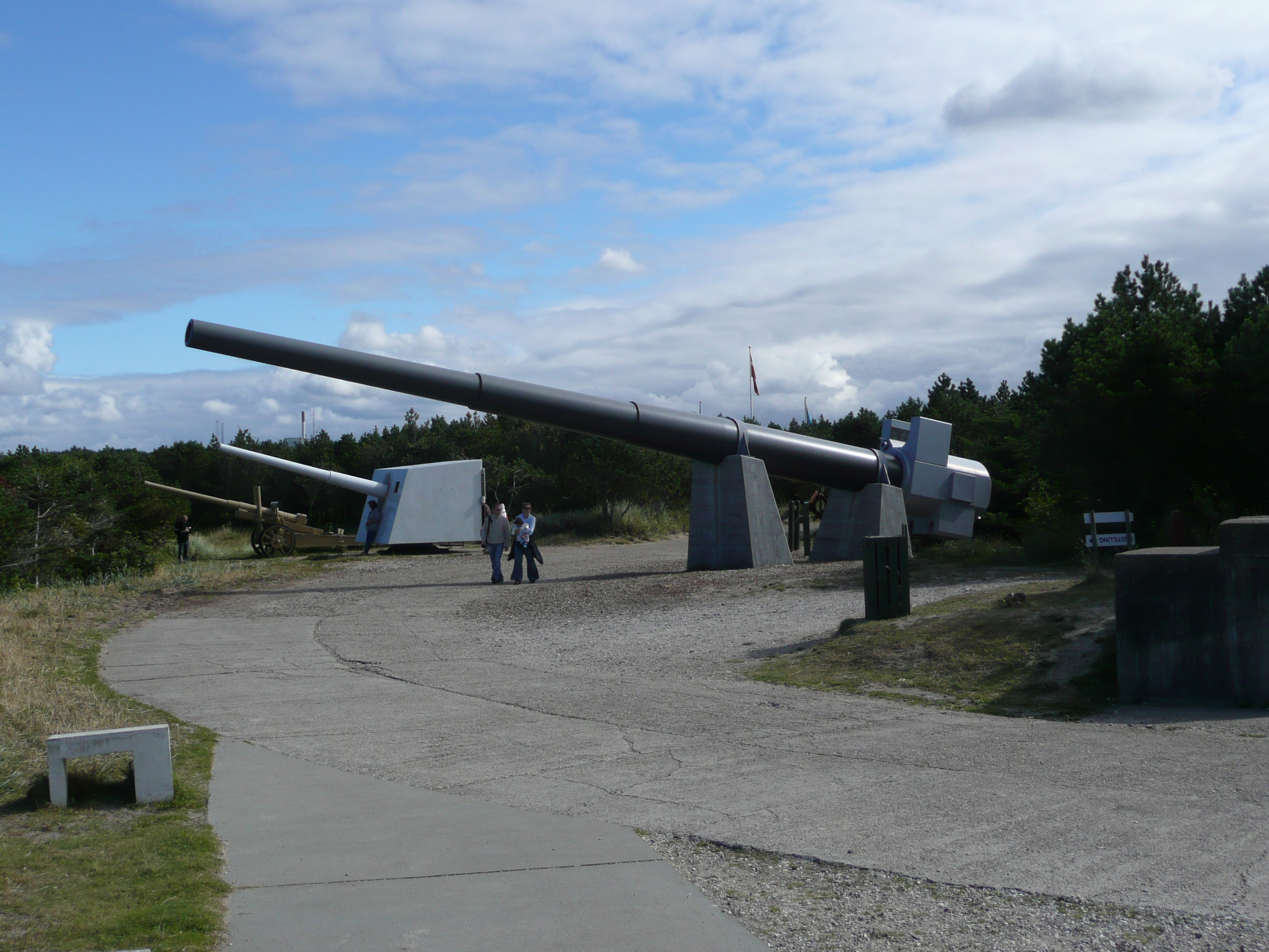 38 cm Geschützrohr der II. Batterie in Hanstholm im Vordergrund, dahinter weitere Geschütze der Festungsanlage